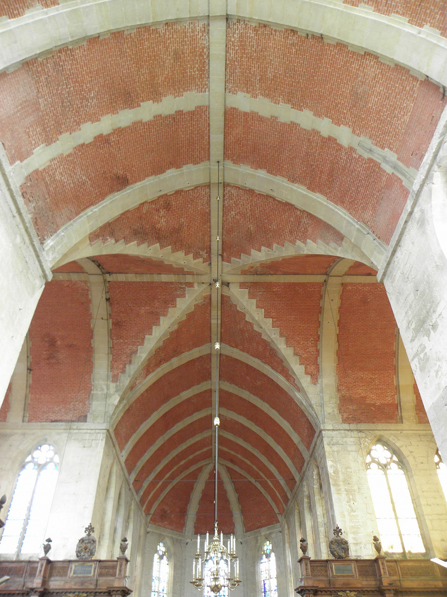 Intérieur de la collégiale Notre-Dame-de-l'Assomption d'Écouis (27). Voûtes.